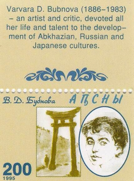 Varvara Bubnova